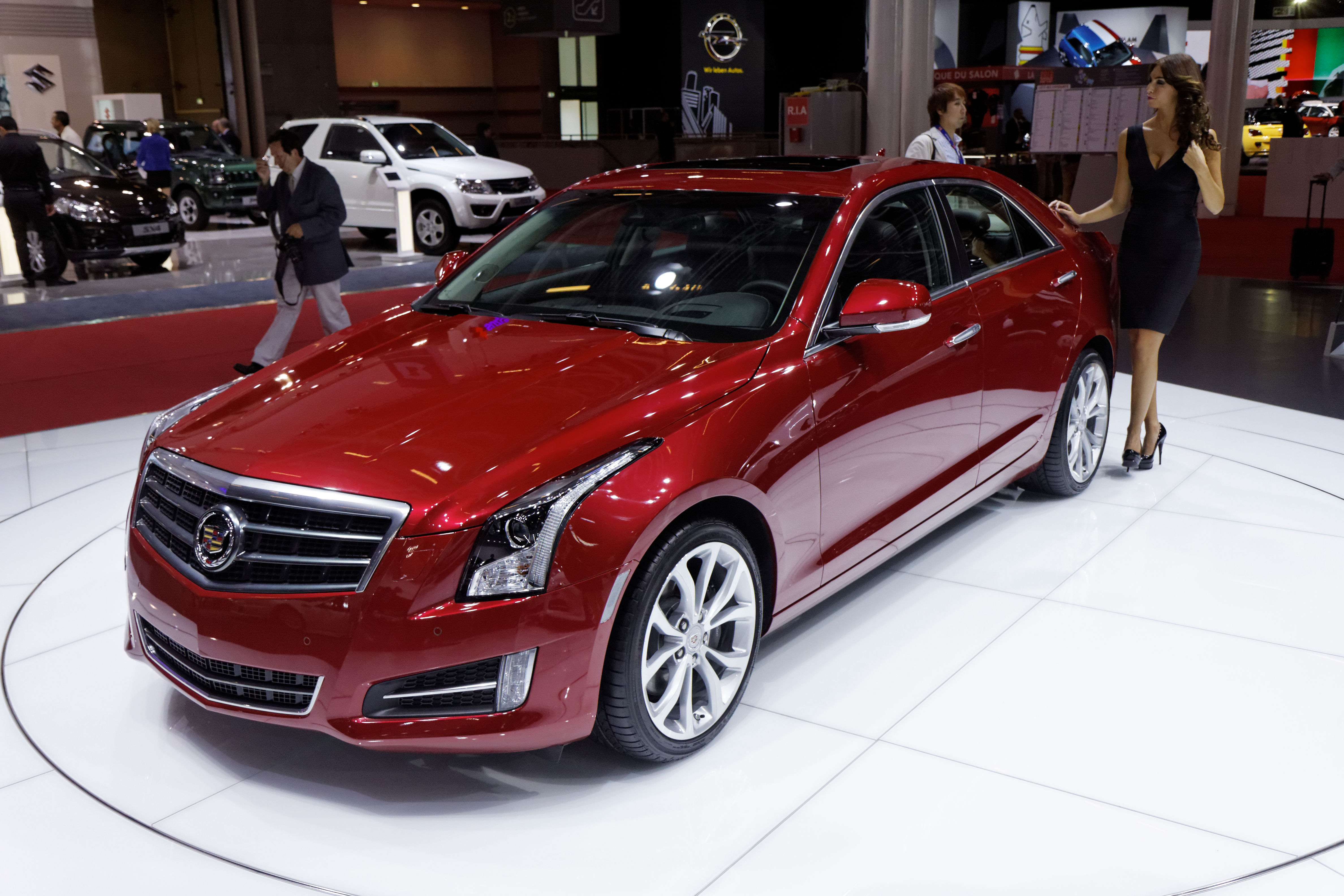 Une Cadillac ATS présentée lors du Mondial de l'Automobile de Paris 2012.